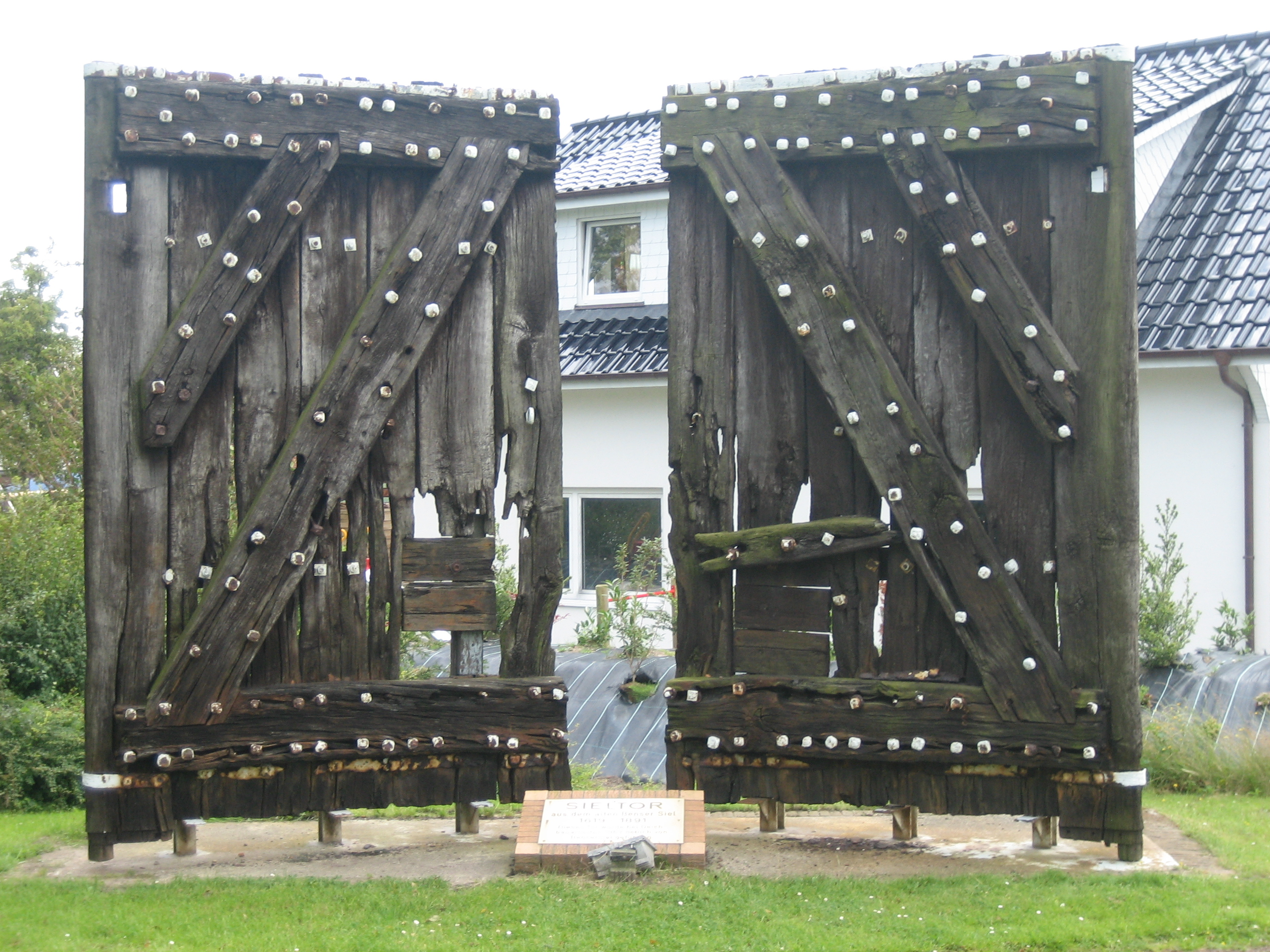 (de) Altes Sieltor in Bensersiel. Aufschrift auf der Tafel unten: SIELTOR aus dem alten Benser Siel 1619 - 1891. Dieses Tor wurde bei Deichbauarbeiten 1967 östlich von Bensersiel gefunden.